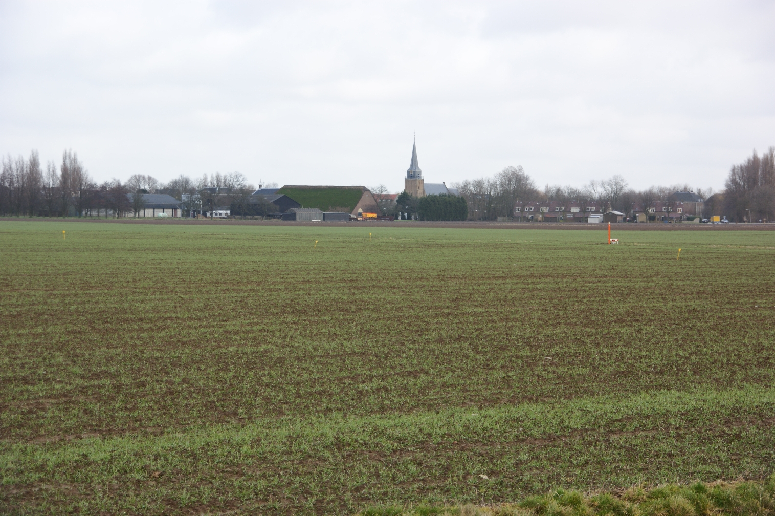 Heinenoord-dorp gezien vanaf het fietspad langs de N-217